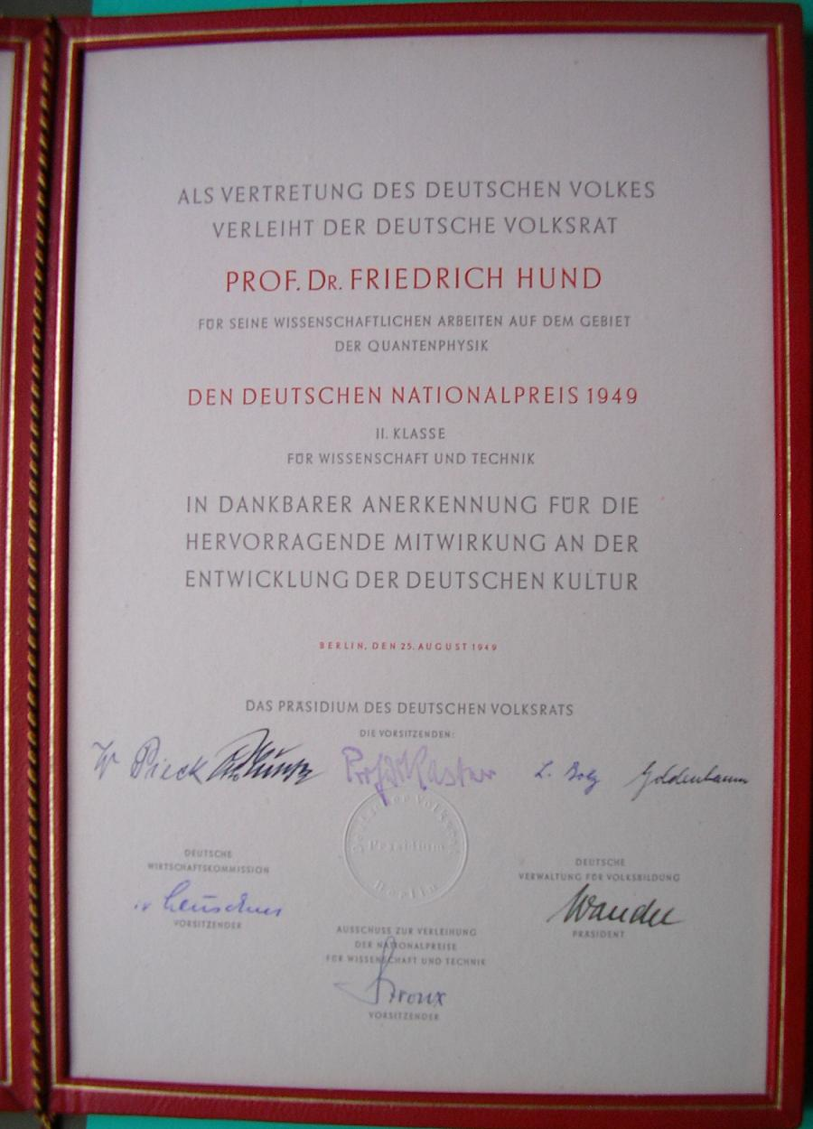 Deutscher Nationalpreis 1949, verliehen an Friedrich Hund vom Präsidium des Deutschen Volksrates in Berlin, den 25. August 1949 (unterschrieben von Wilhelm Pieck und anderen Personen).